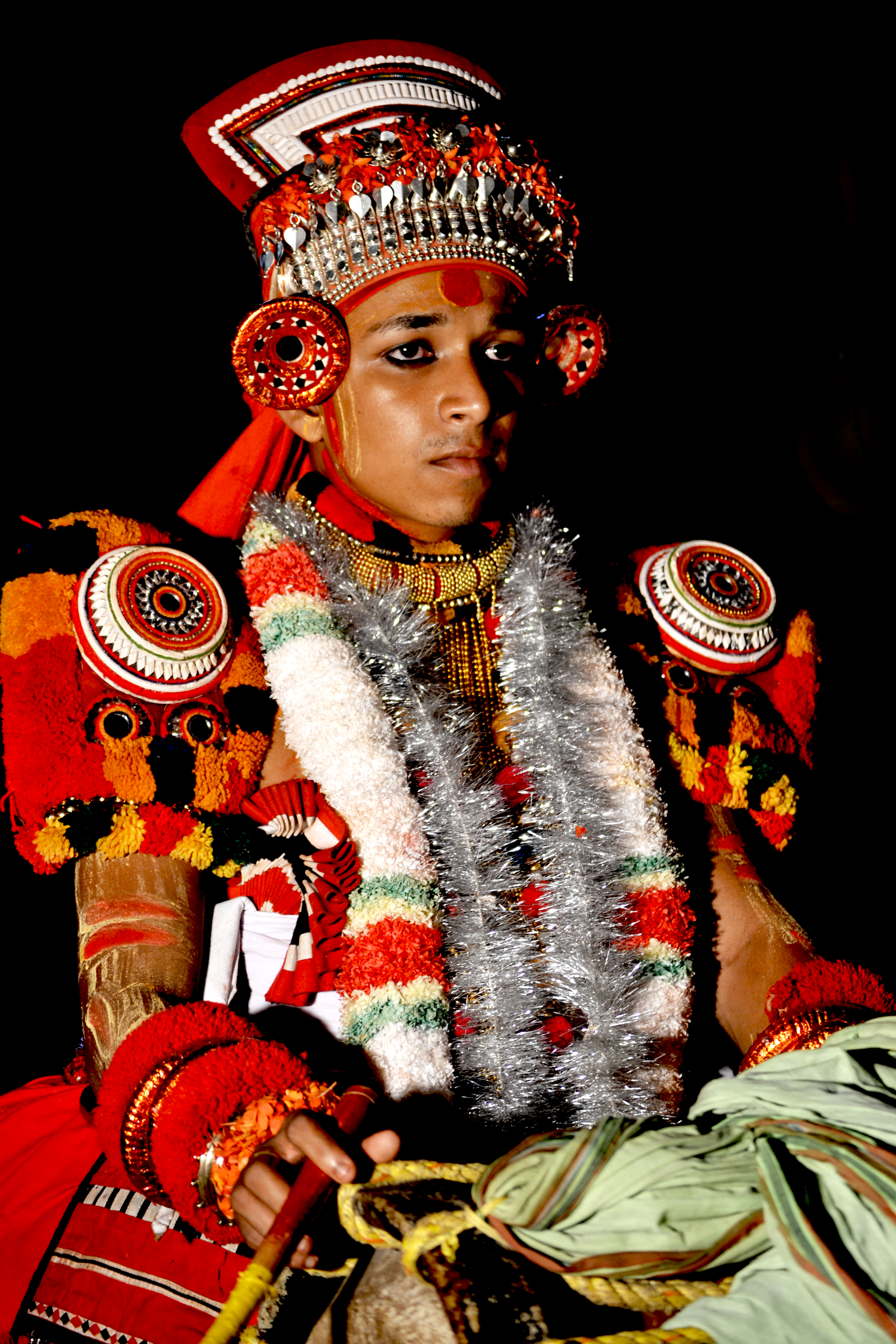 വിഷ്ണുമൂര്‍ത്തി തെയ്യത്തിന്റെ തോറ്റം